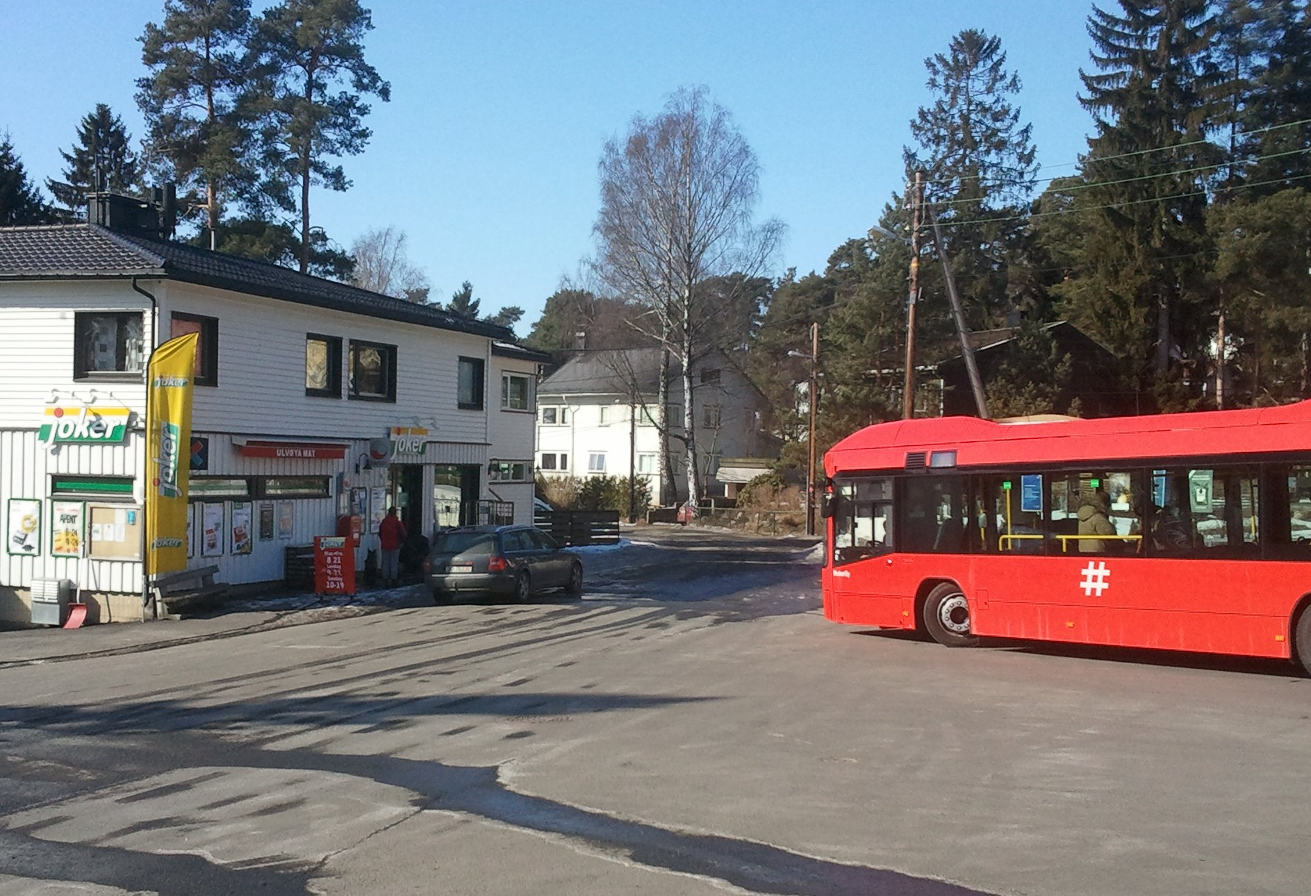 Bussholdeplassen på Ulvøya ved Vargveien 16.